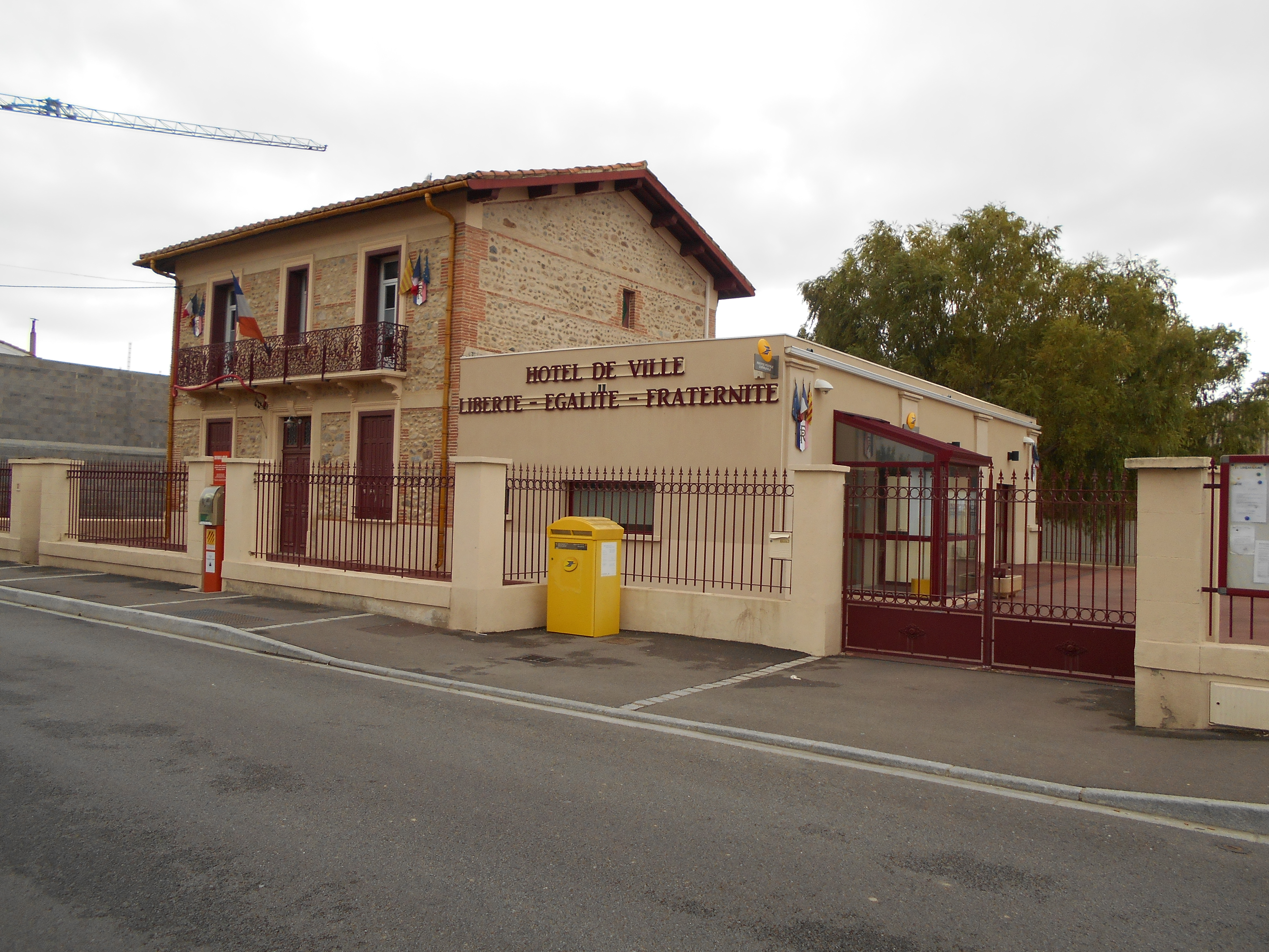 Casa de la vila de Vilanova de la Ribera